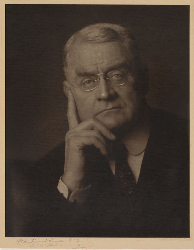 John Hamilton, 1st Viscount Sumner (1859-1934)